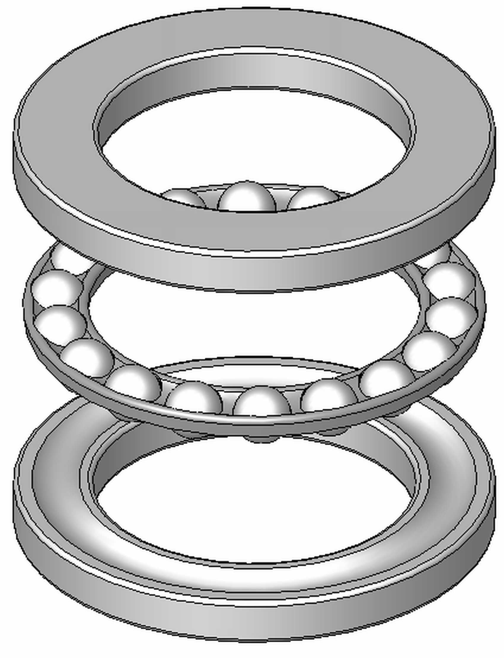 Axial-Rillenkugellager, Blechkaefig aus Stahl, zerlegbar, Explosionsdarstellung, Hinweis: Innenaufbau des Lagers (insbesondere des Kaefigs) variiert je nach Hersteller und Baugroesse rolling contact bearings